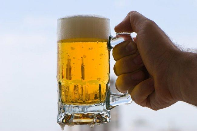 mano con una jarra de cerveza